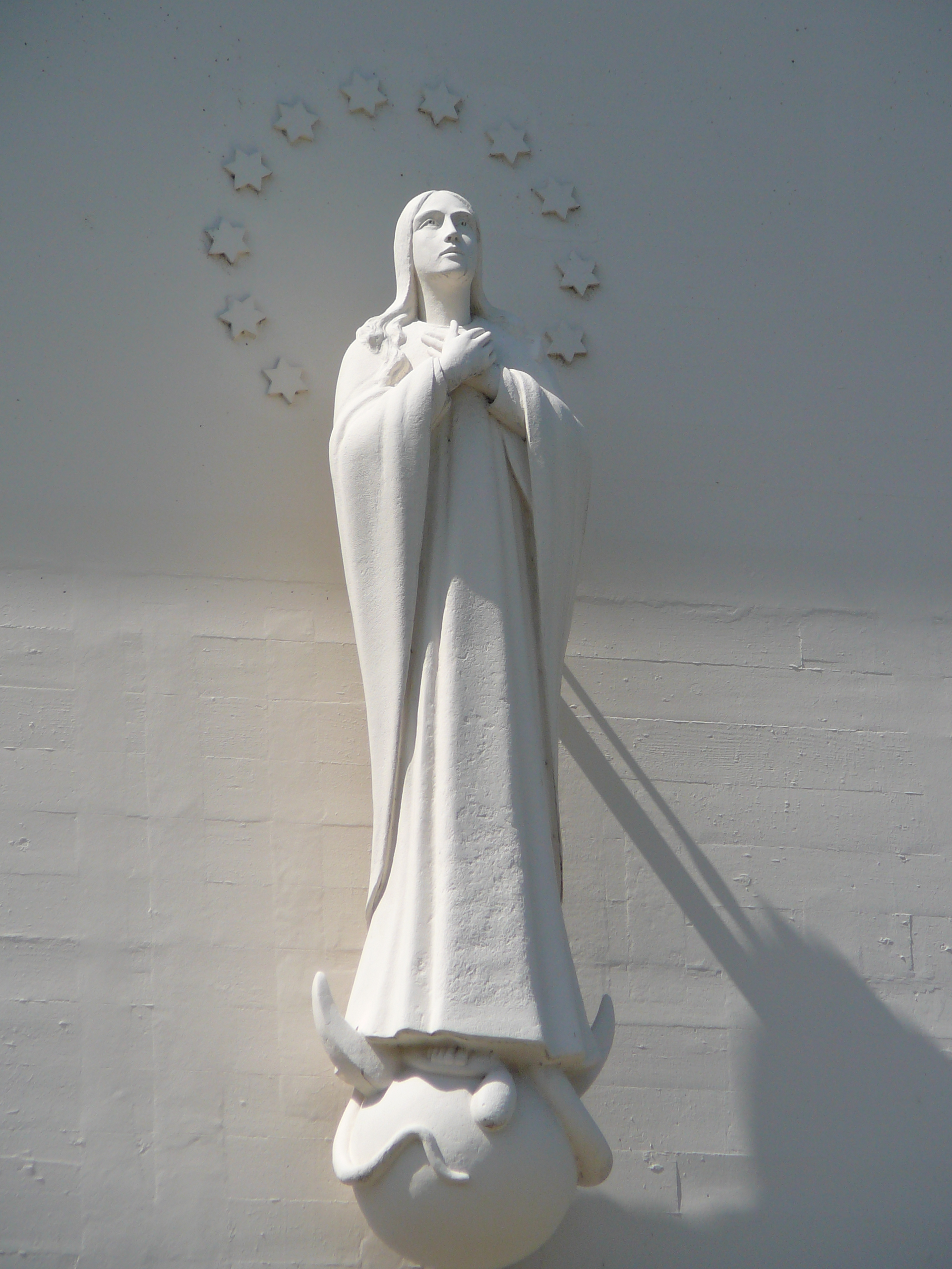 Römisch-katholische Kirche Maria Lourdes Marienstatue an Frontwand